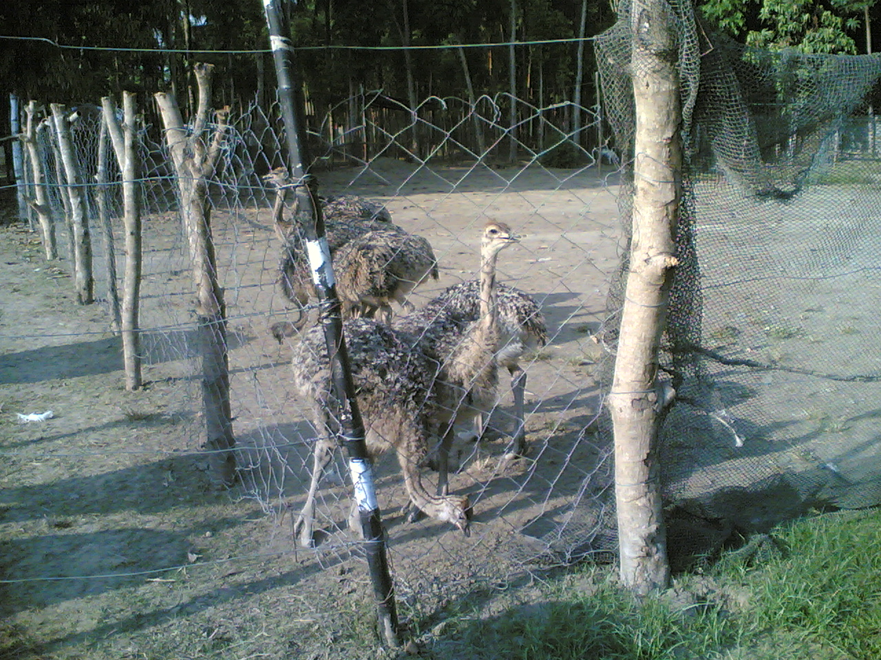 Tagalog: Mga ostrich sa farm ng aking ama. Emir Mendoza, aking gawa.